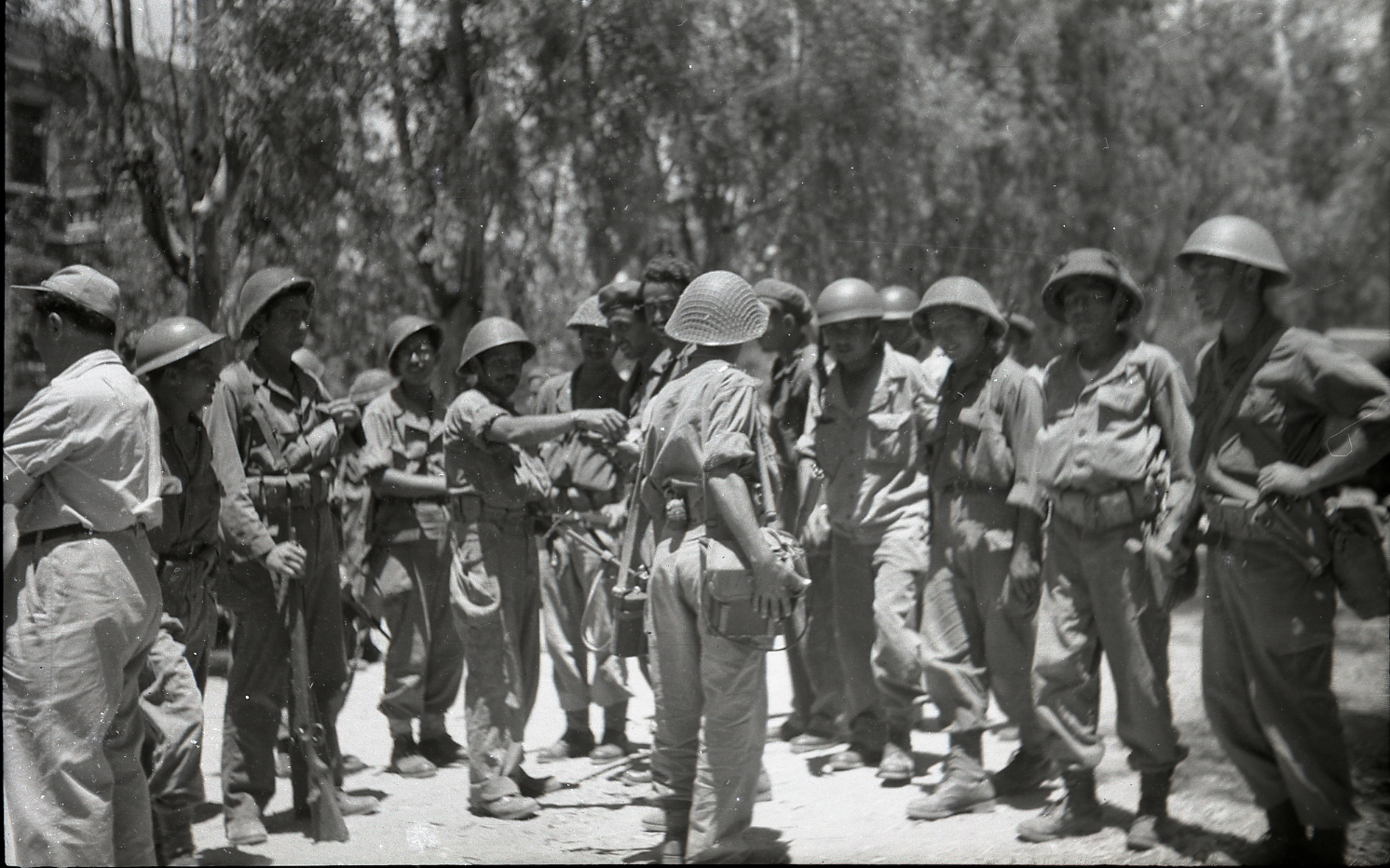 צריפין סרפנד כיבוש הבסיס 1948 2 צלם בנו רותנברג גנזך המדינה